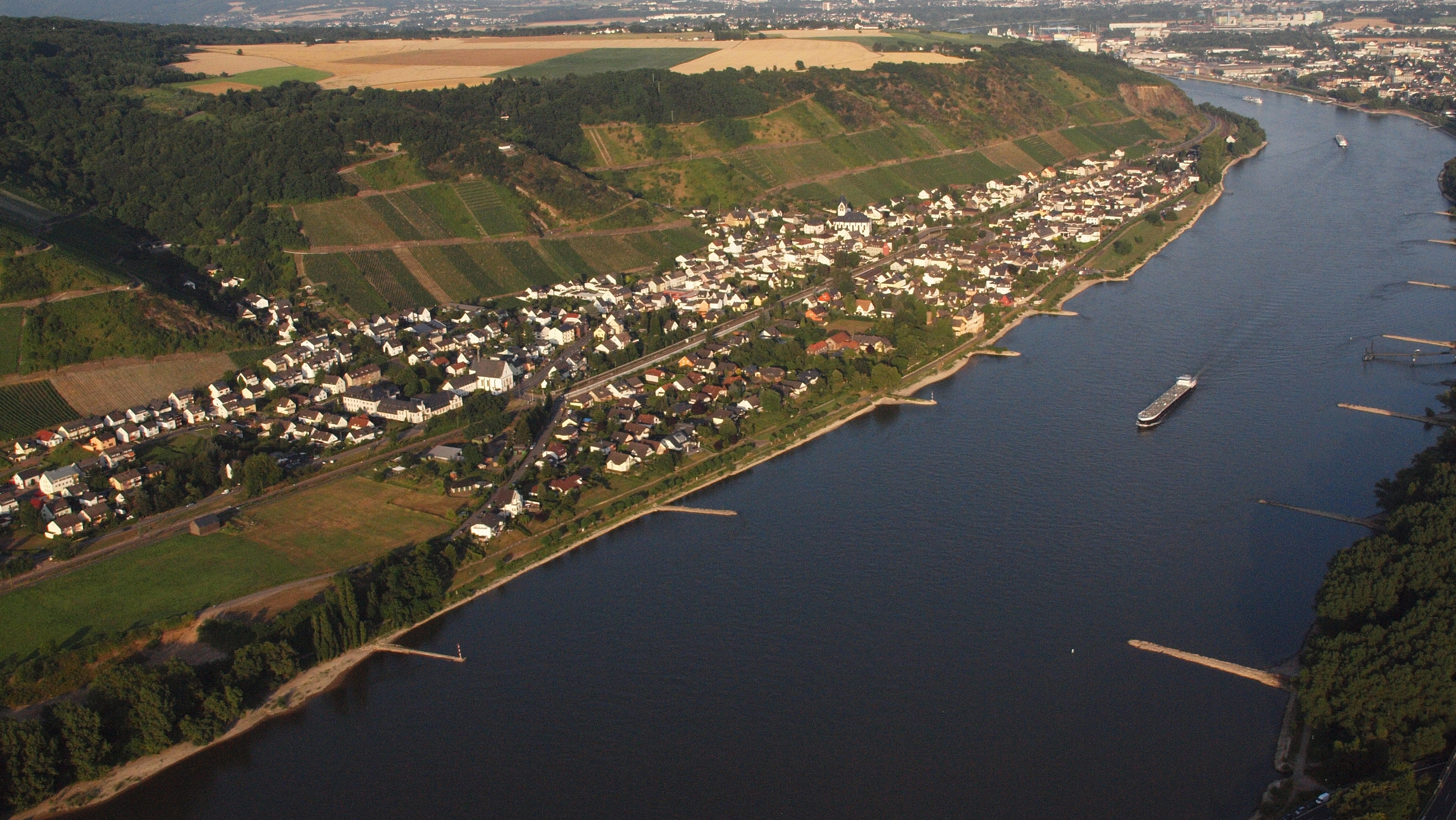 Leutesdorf: Luftaufnahme